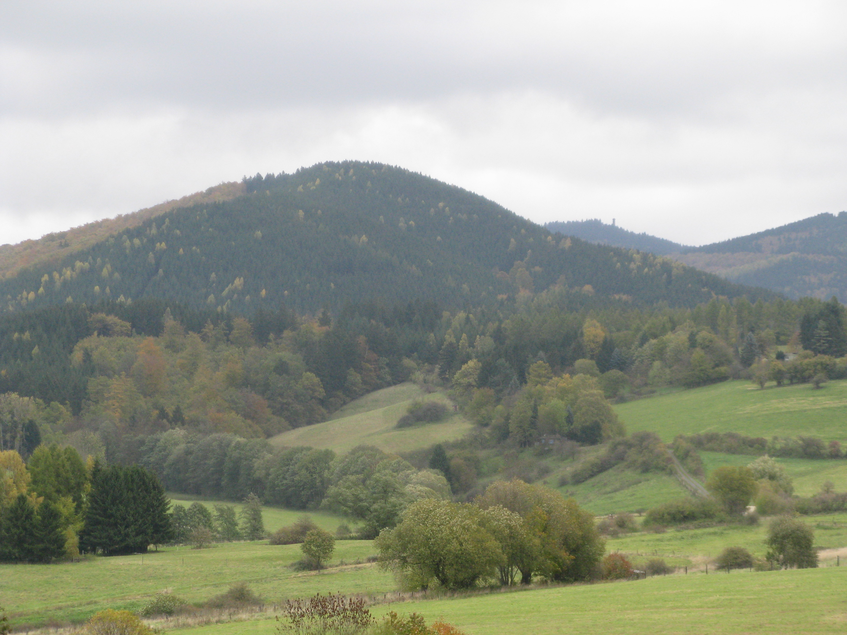 Der Eichelnkopf bei Herzberg am Harz, rechts im Hintergrund der Große Knollen mit Aussichtsturm